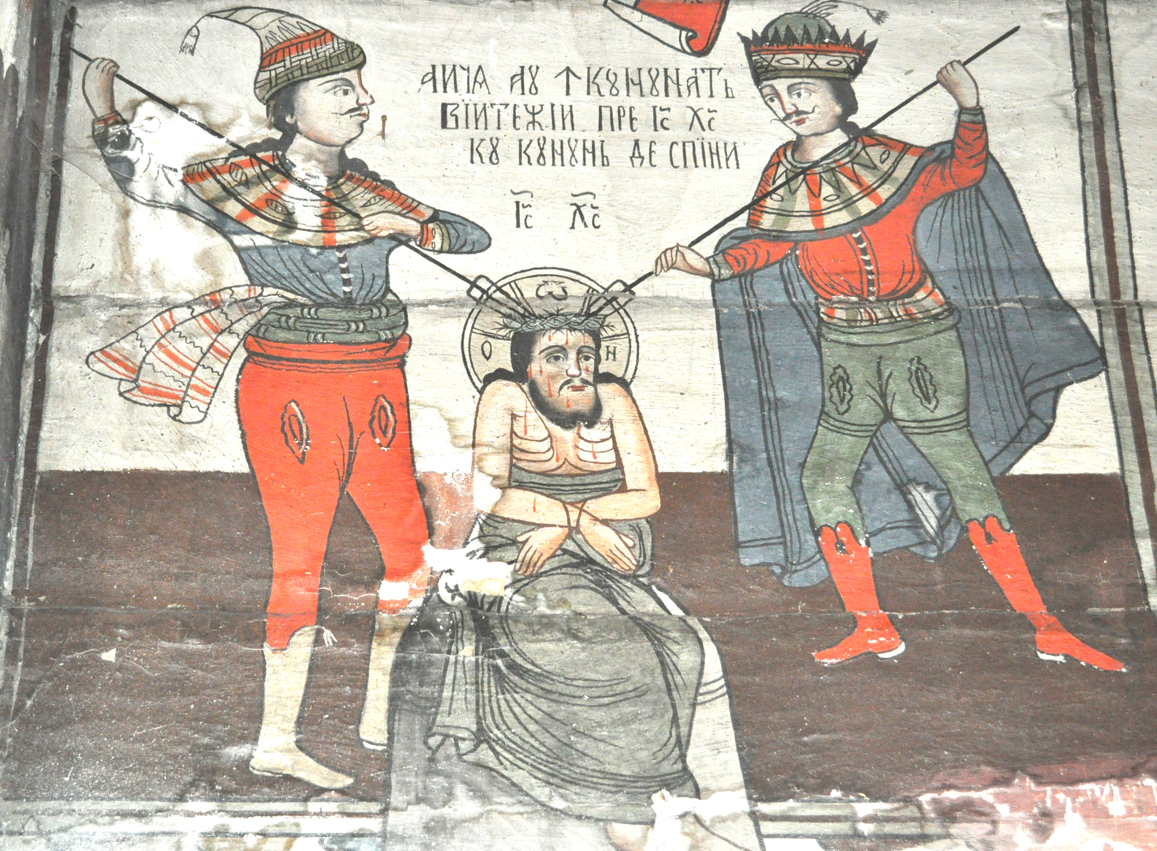 Biserica de lemn “Învierea Domnului” din Cubleșu, județul Sălaj